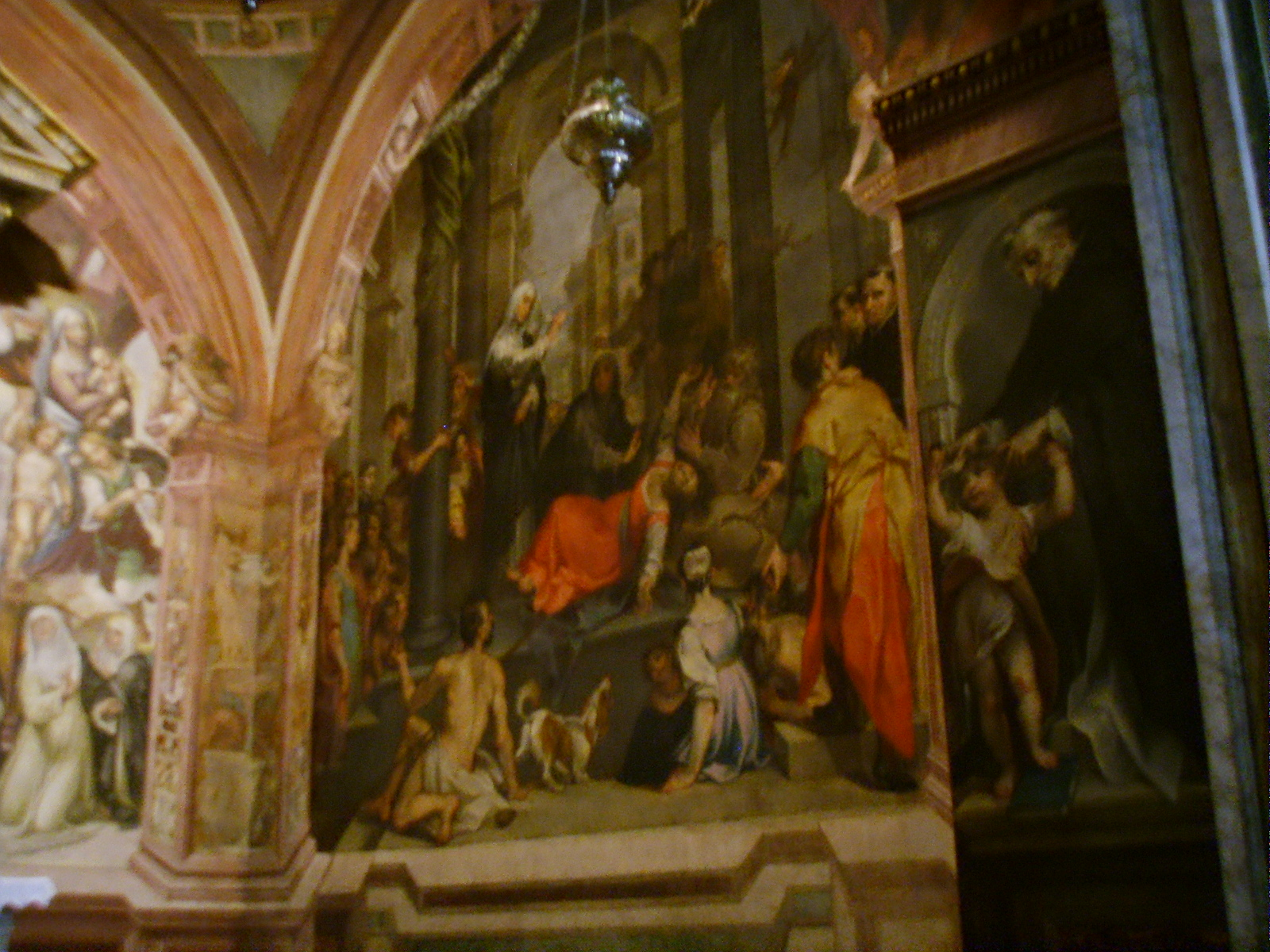 Siena, san domenico, cappella di Santa Caterina, parete di dx, Francesco Vanni, Santa che libera un'ossessa di